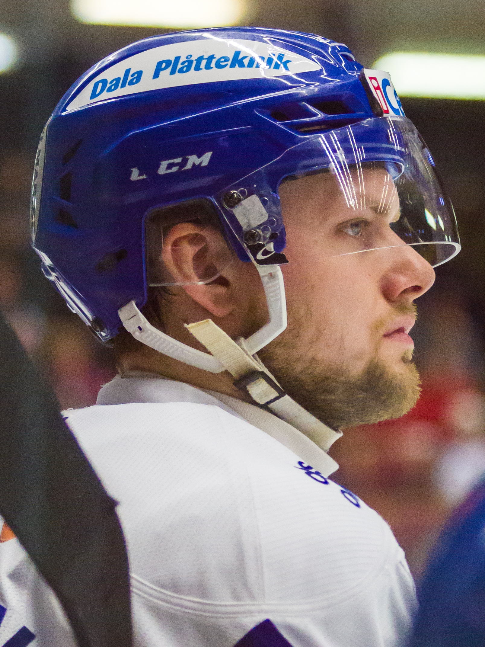 Viktor Mårtensson i Leksands IF.